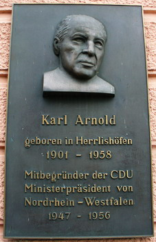 Karl Arnold - CDU - Gedenktafel in Herlishöfen bei Biberach an der Riß selbst fotografiert am 12.9.2005 von user:Enslin